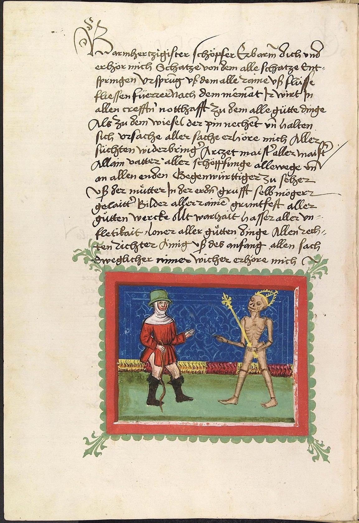 Codex Palatinus germanicus 76, Blatt 31v - Johannes von Tepl: Der Ackermann aus Böhmen - Fürbittgebet des Ackermanns